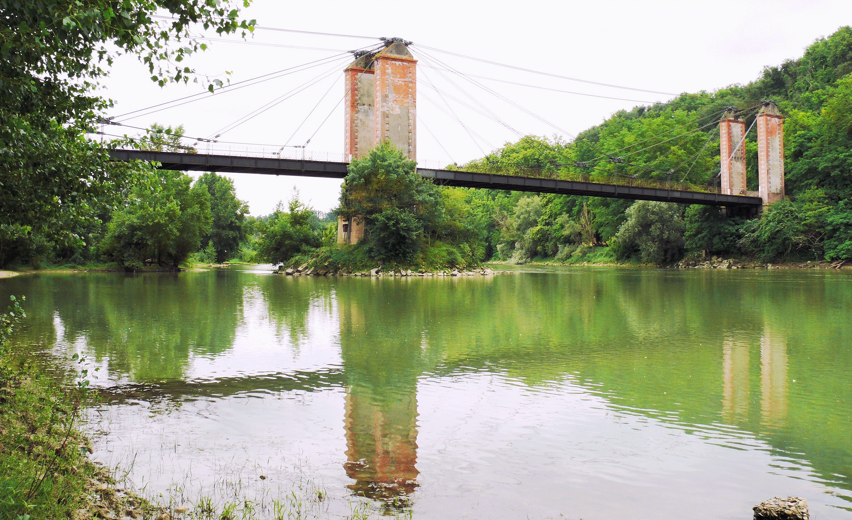 Bourret (Tarn-et-Garonne) - Pont Gisclard au-dessus de la Garonne